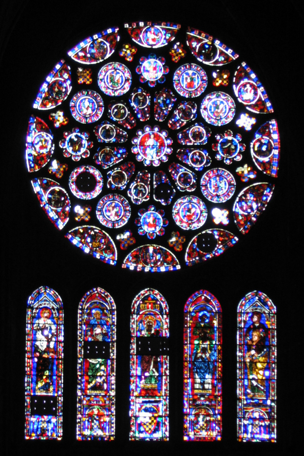 Rosace du portail sud de la cathédrale de Chartres.